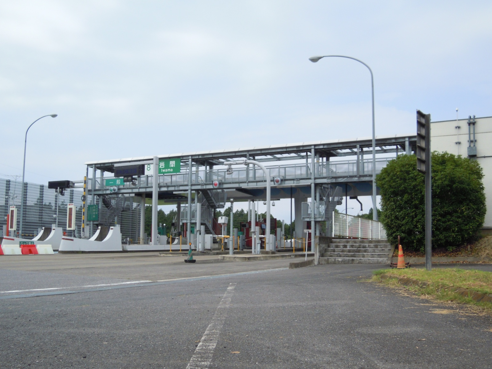 茨城県笠間市にある常磐自動車道の岩間インターチェンジ料金所を一般道側から。